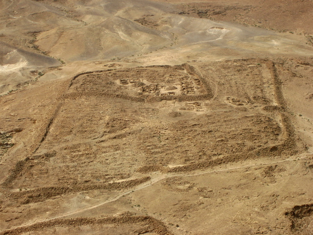 Fotografia di un campo trincerato romano della X legione presa dalla sommità di Masada.Foto personale.Masada,21/03/06